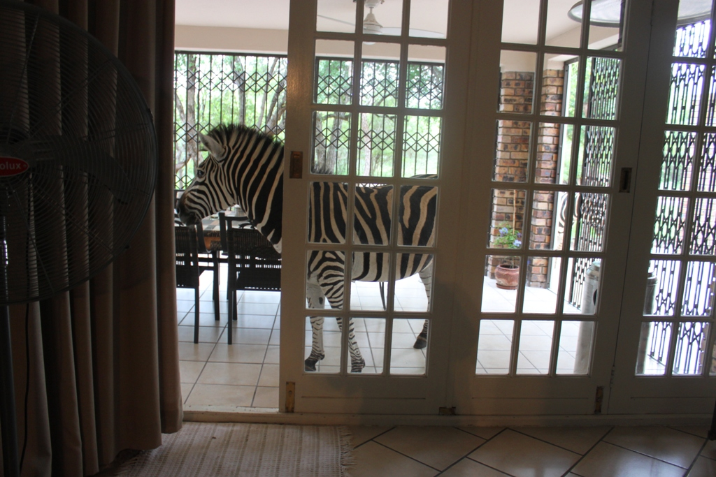 Ein wildes Zebra besucht die Veranda des Hauses in Marloth Park